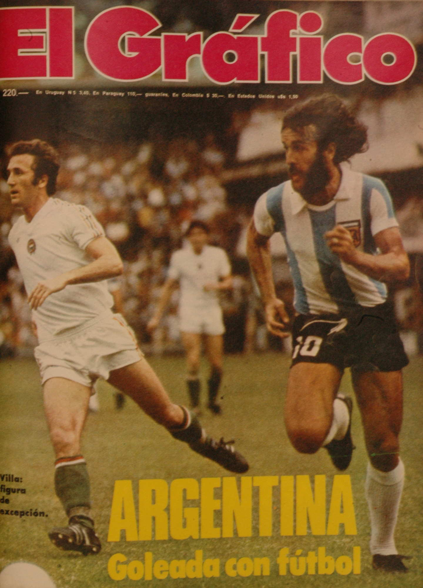 El Grafico del 01 de Marzo de 1977. Edicion 2995